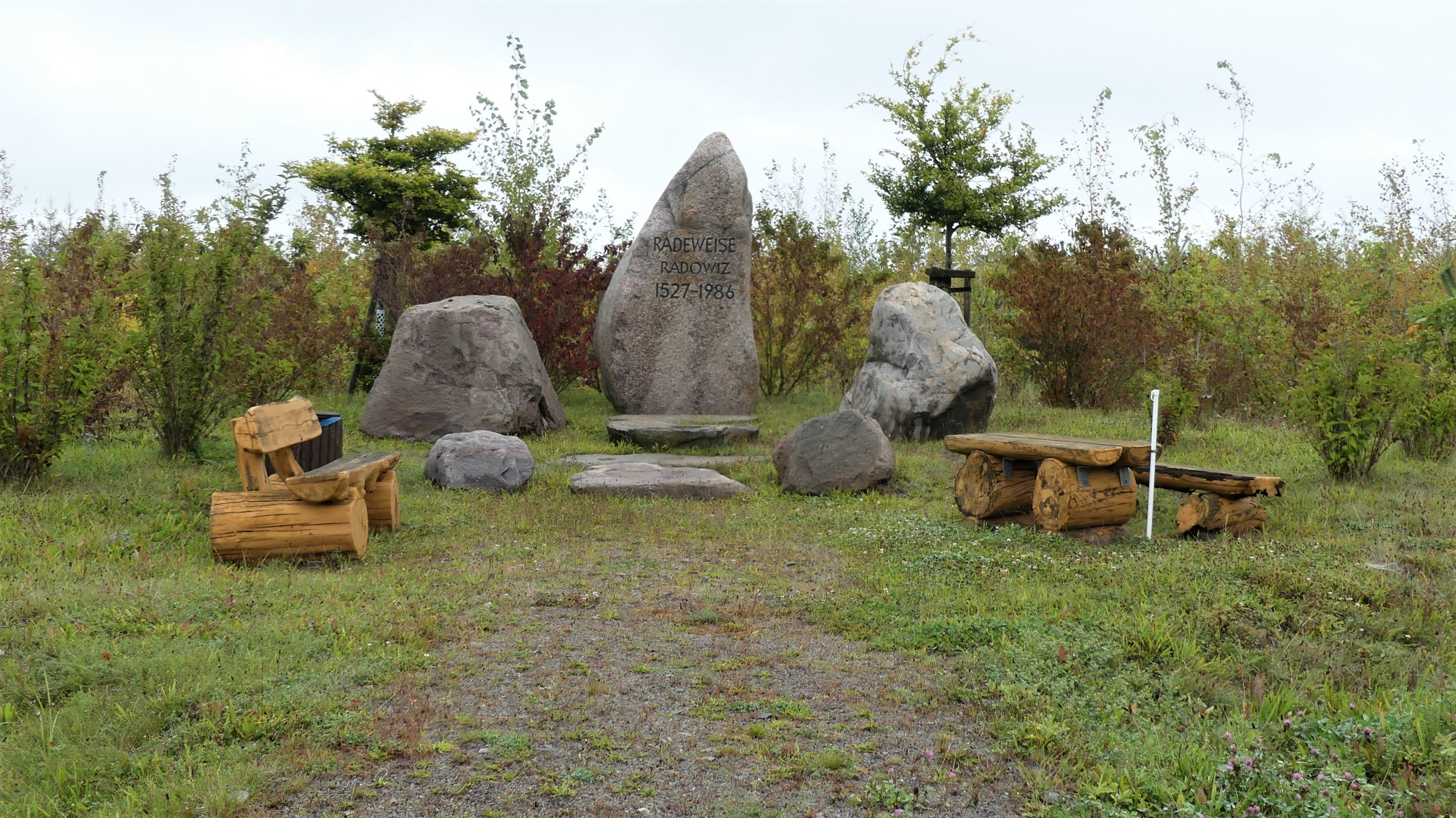 Erinnerungsstätte für das abgebaggerte Dorf Radeweise im Gebiet des Tagebaus Welzow-Süd.